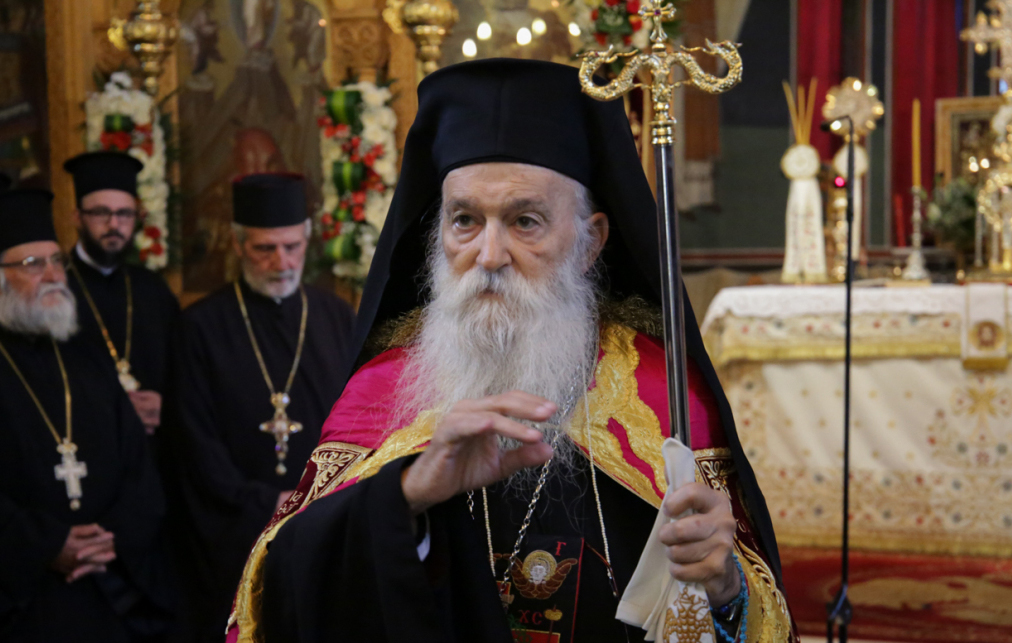 Ο Σεβασμιώτατος Μητροπολίτης Γλυφάδας κ.Παύλος - Metropolitan of Glyfada mr Pavlos